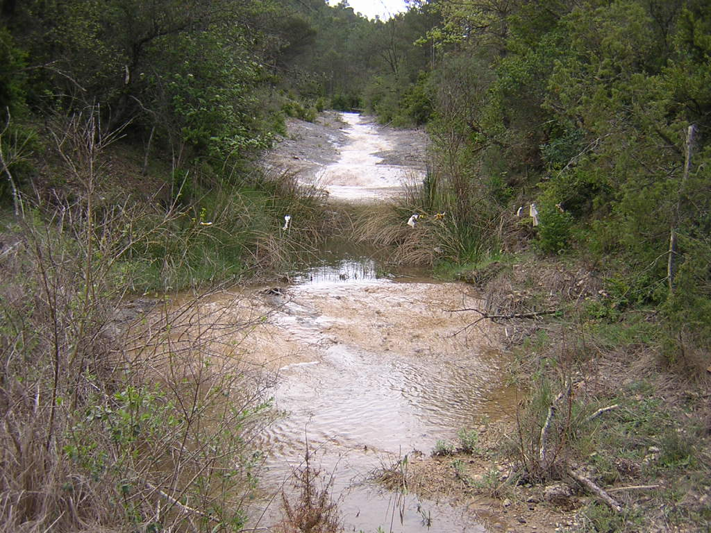 El torrent de la Baga del Coll (Monistrol de Calders, Moianès)